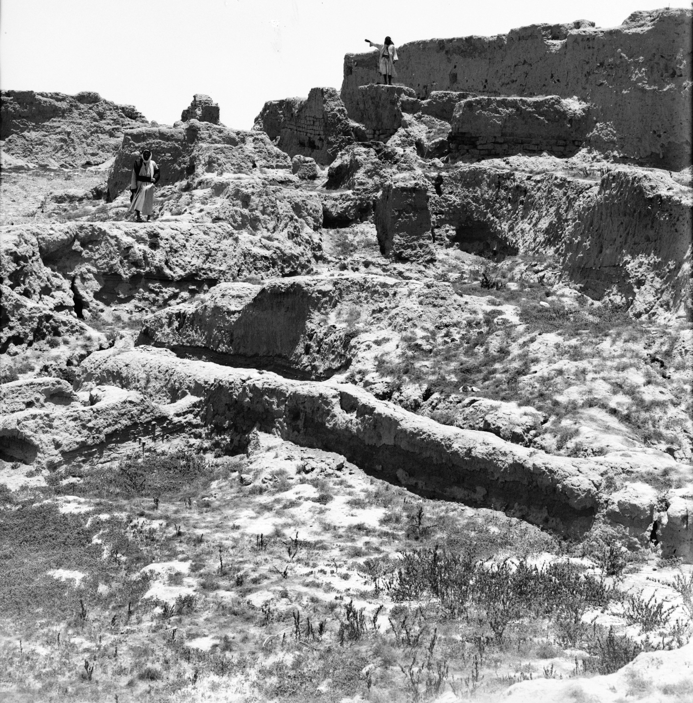 חפירות בצידו הדרומי של תל ג'מה בעת שנחפר על ידי פלינדרס פיטרי